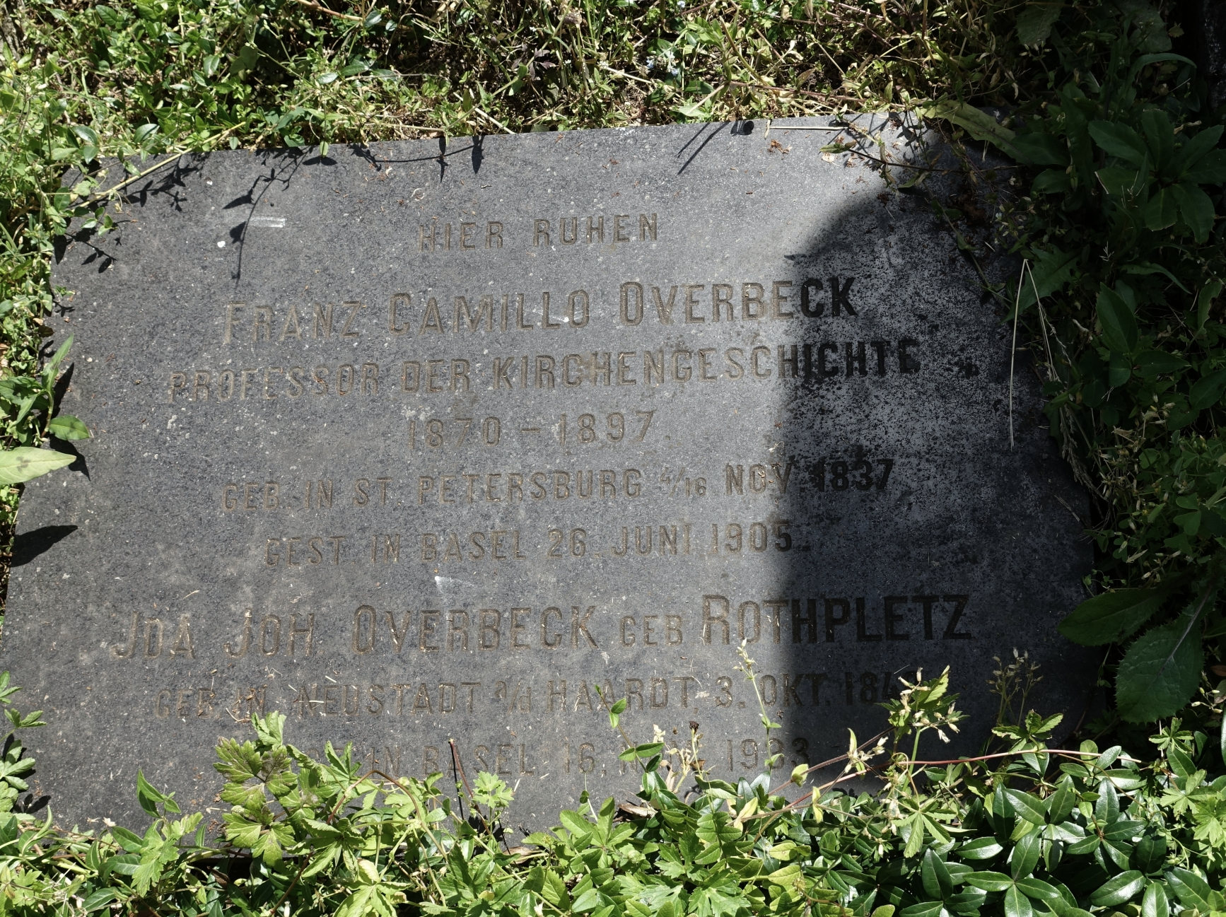 Franz Camille Overbeck-Rothpletz (1837-1905) Kirchenhistoriker und Professor für Evangelische Theologie. Grab auf dem Friedhof Wolfgottesacker, Basel